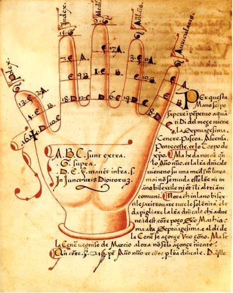 Comput digital, XVe siècle La main est le premier "manuel" scolaire de l'enfant : sur les doigts on apprend les notes de musique, écrites en lettres d'alphabet, le calcul et le comput digital, pour connaître la date des fêtes mobiles : "Qui veut savoir le calendrier, sur la main comme le berger, avant tout œuvre sans songer, a b c d e f g". Au Moyen Âge, savoir ses leçons sur le bout des doigts n'est pas une simple expression.